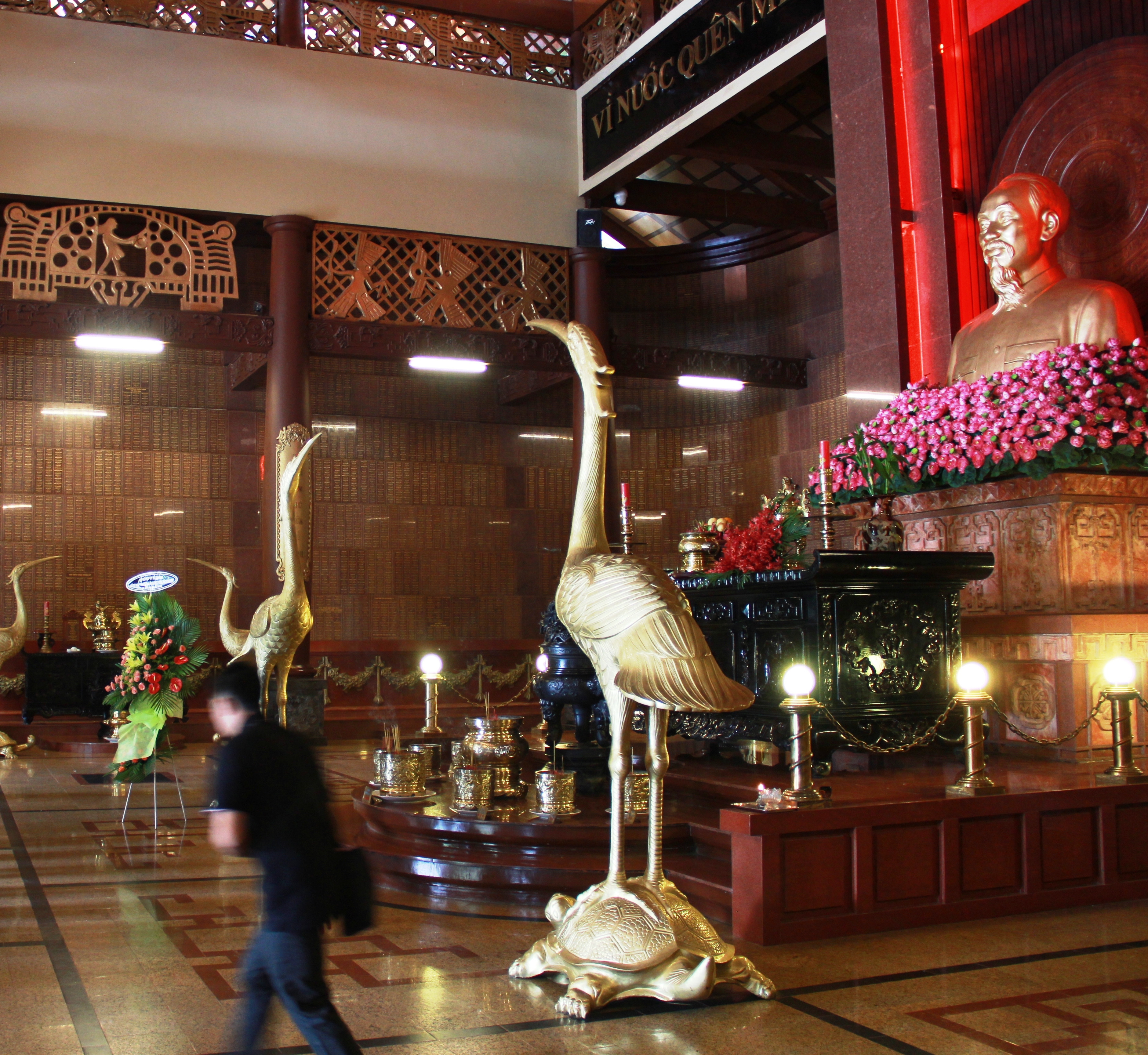 Bên trong Đền bến dược, ảnh tự chụp bằng máy ảnh kỹ thuật số